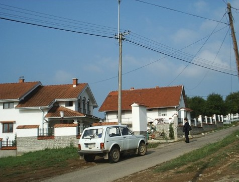 Загужање.